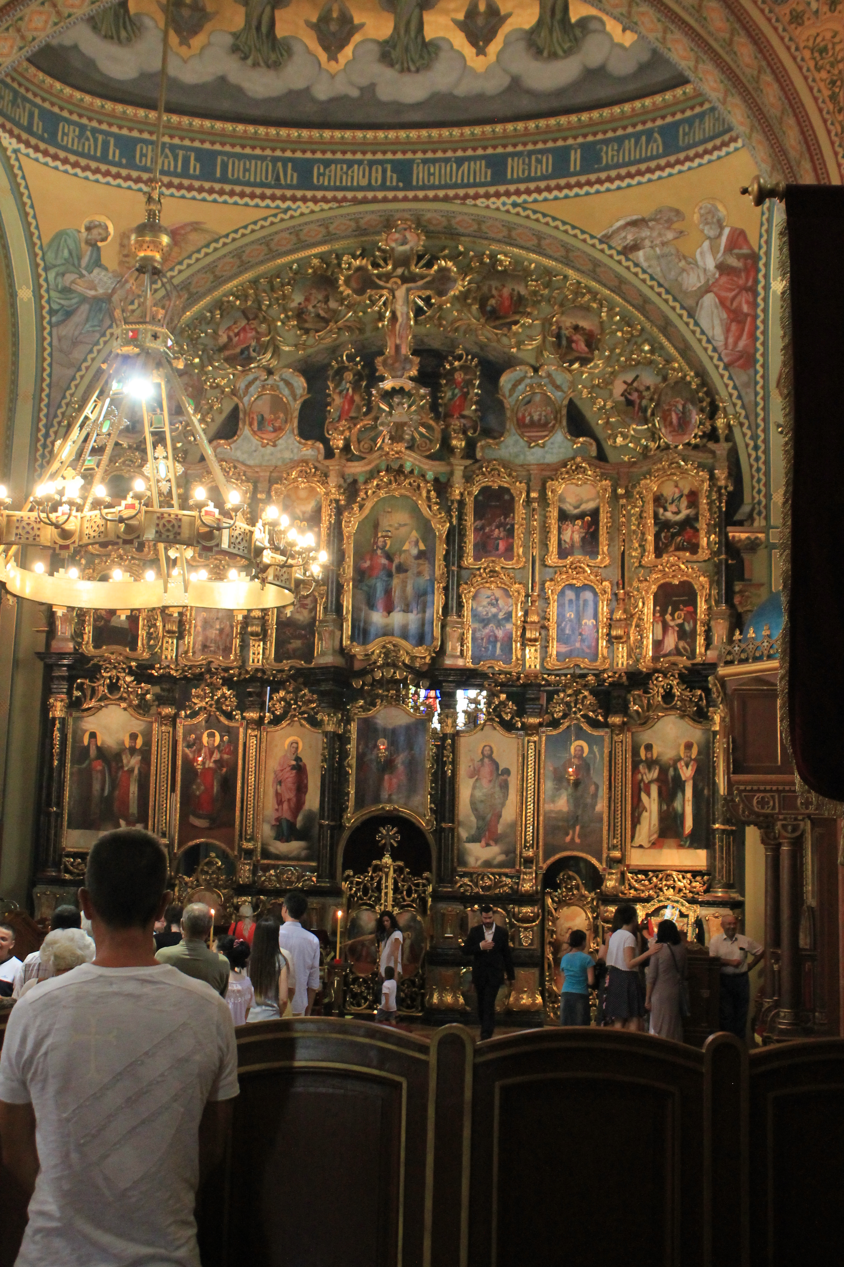 Saborna crkva u Sremskim Karlovcima